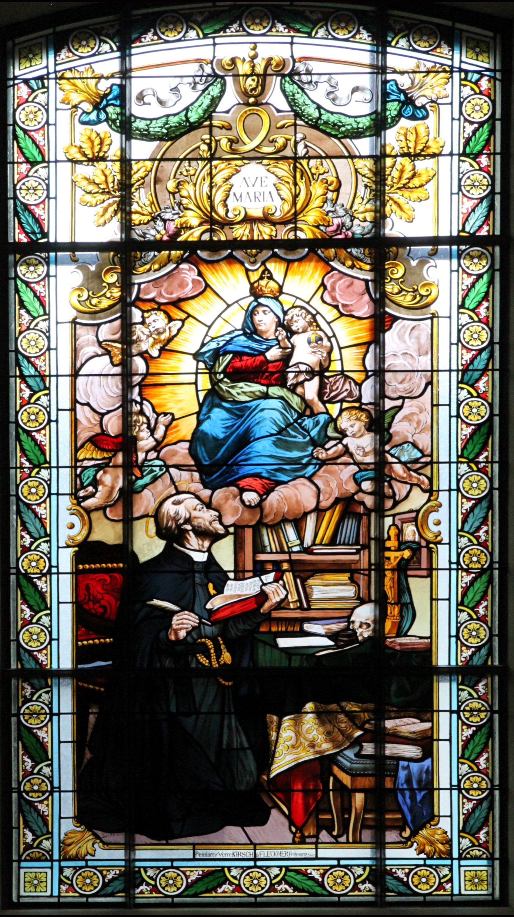 Heiliger Petrus Kanisius und Mariä Himmelfahrt in der Liebfrauenkirche Freiburg (Schweiz), Glasmalerei von Kirsch & Fleckner, Freiburg (Schweiz), 1897